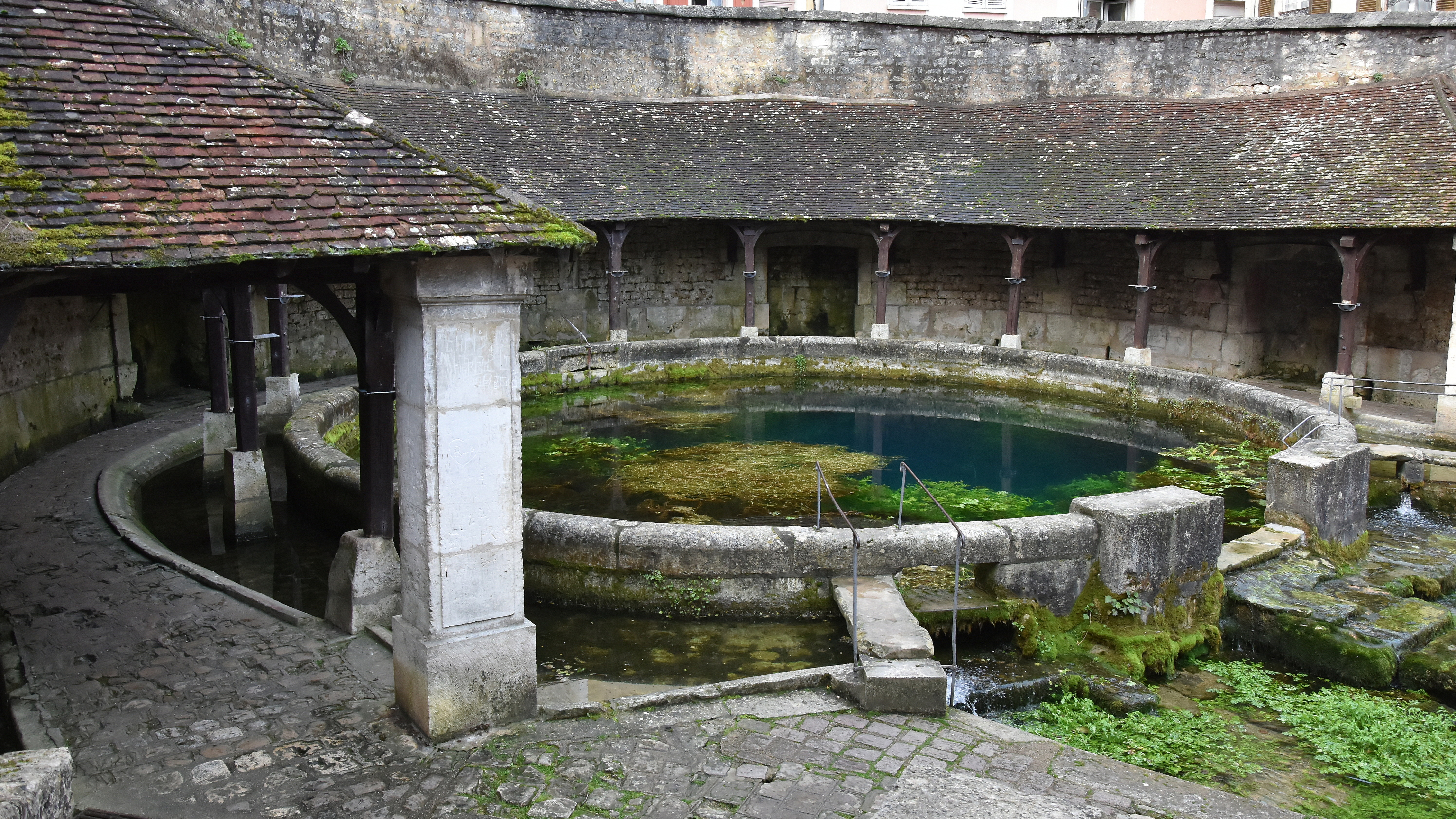 Fosse de Dionne - Tonnerre (Yonne), Frankrijk